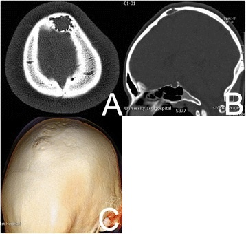 Istiocitoma fibroso benigno dell'osso parietale rilevato mediante TC. Si evidenzia una lesione osteolitica, a margini ben definiti, circondata da un orletto di sclerosi. (A: immagine assiale, B: immagine sagittale, C: render 3D) Modificato da Yang et Al. 2015 Benign fibrous histiocytoma of parietal bone: case report and review of the literature. World Journal of Surgical Oncology. CC-BY 4.0 License